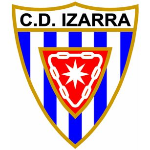 Escudo CD Izarra 1941